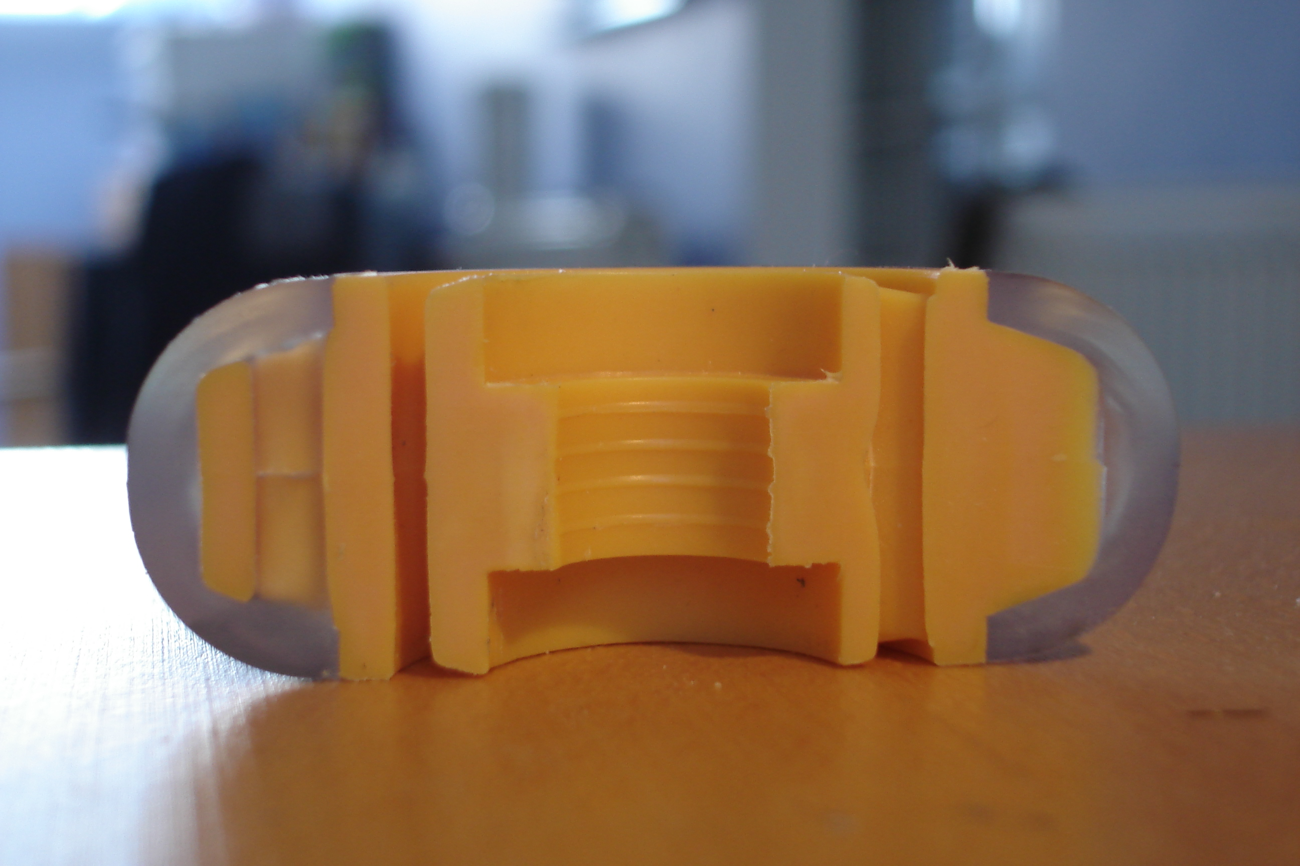 Roue de patin à roulettes sciée en deux. Vue de coupe.